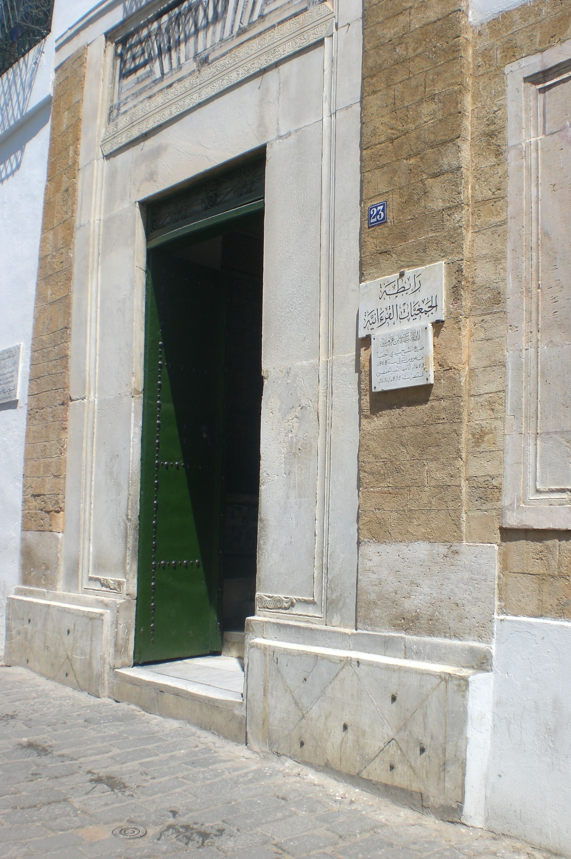 Zaouia in Tunis